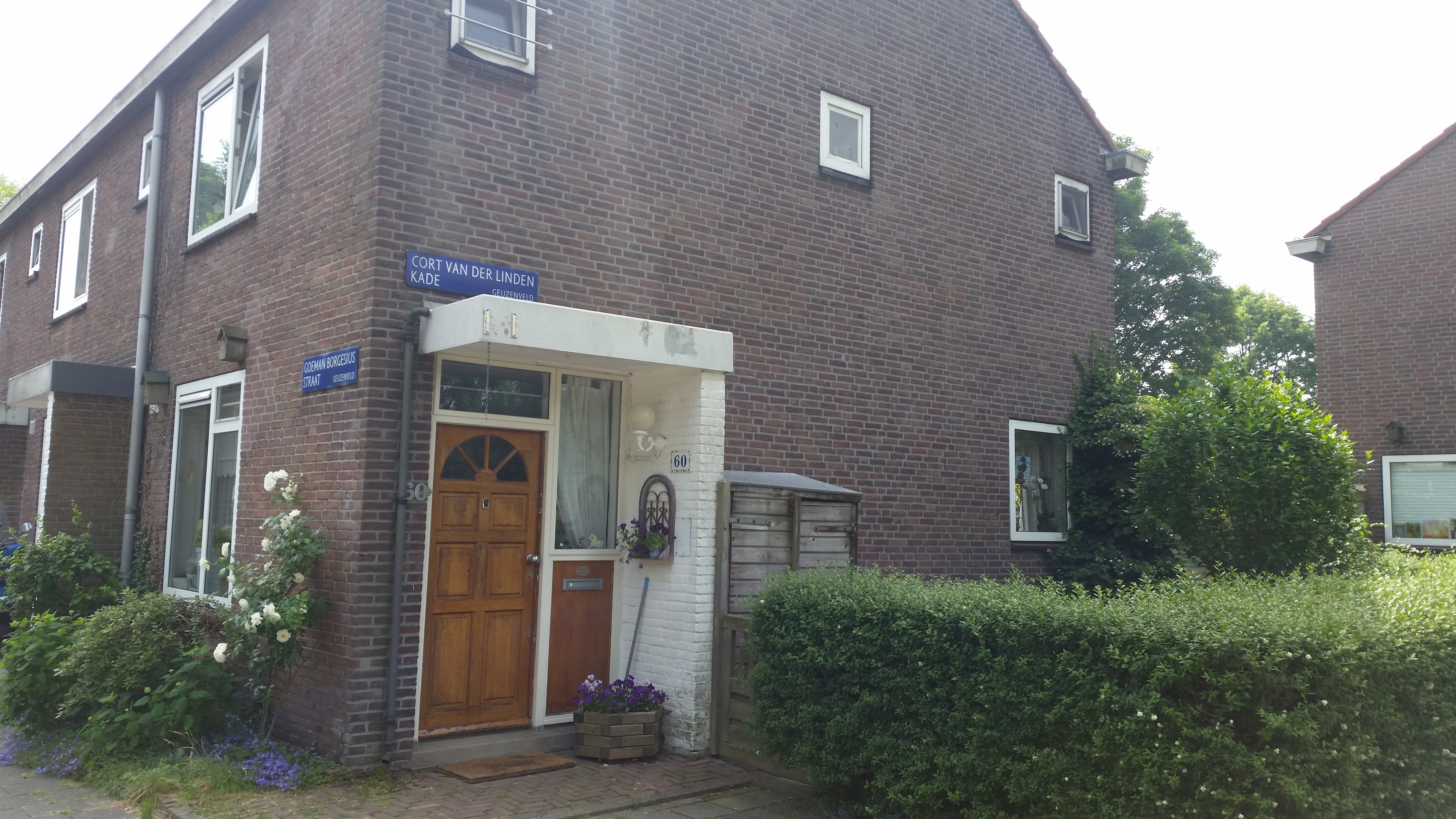 Cort van der Lindenkade, Amsterdam, vanwege deur in zijgevel